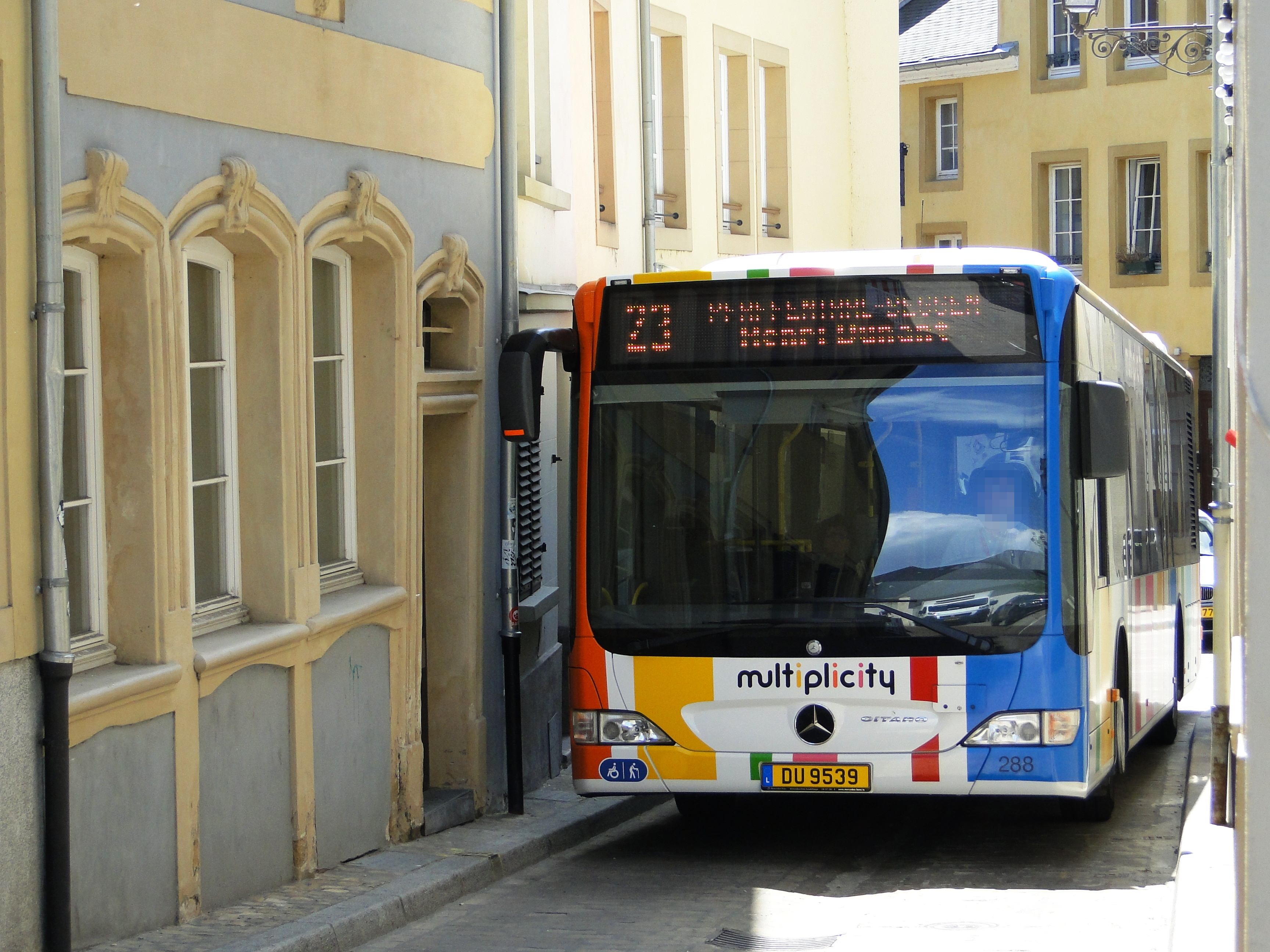 E Bus (DU9539, AVL 288) vun der Linn 23 a Richtung Beggen/Henri Dunant an der Tréiererstrooss am Gronn.